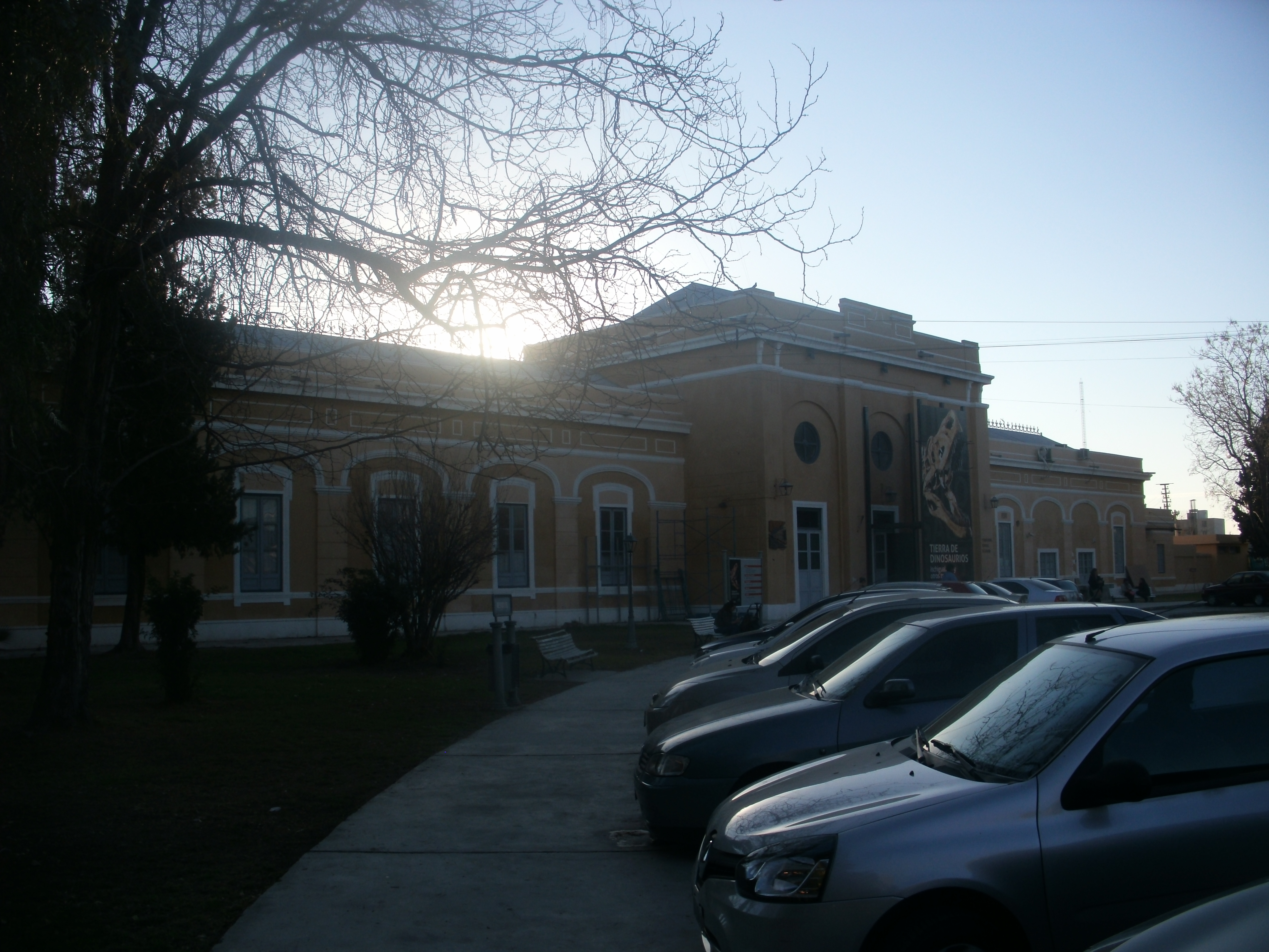 Frente del Museo de Ciencias Naturales de San Juan, hacia Avenida España.